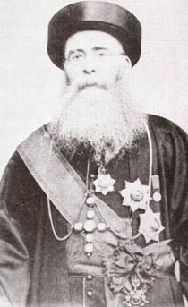 patriarcha Józef VI Emmanuel II